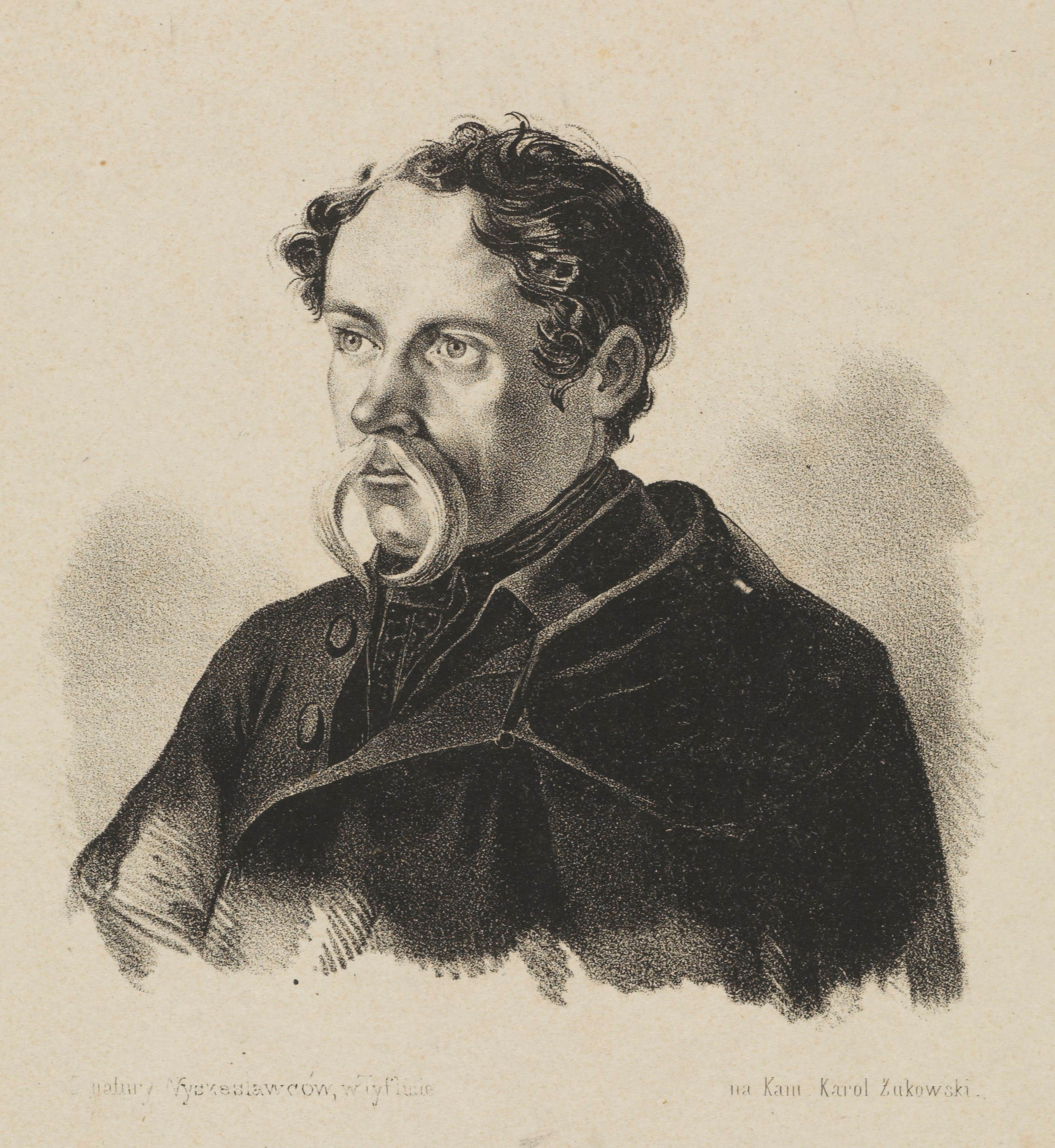 Tadeusz Łada-Zabłocki